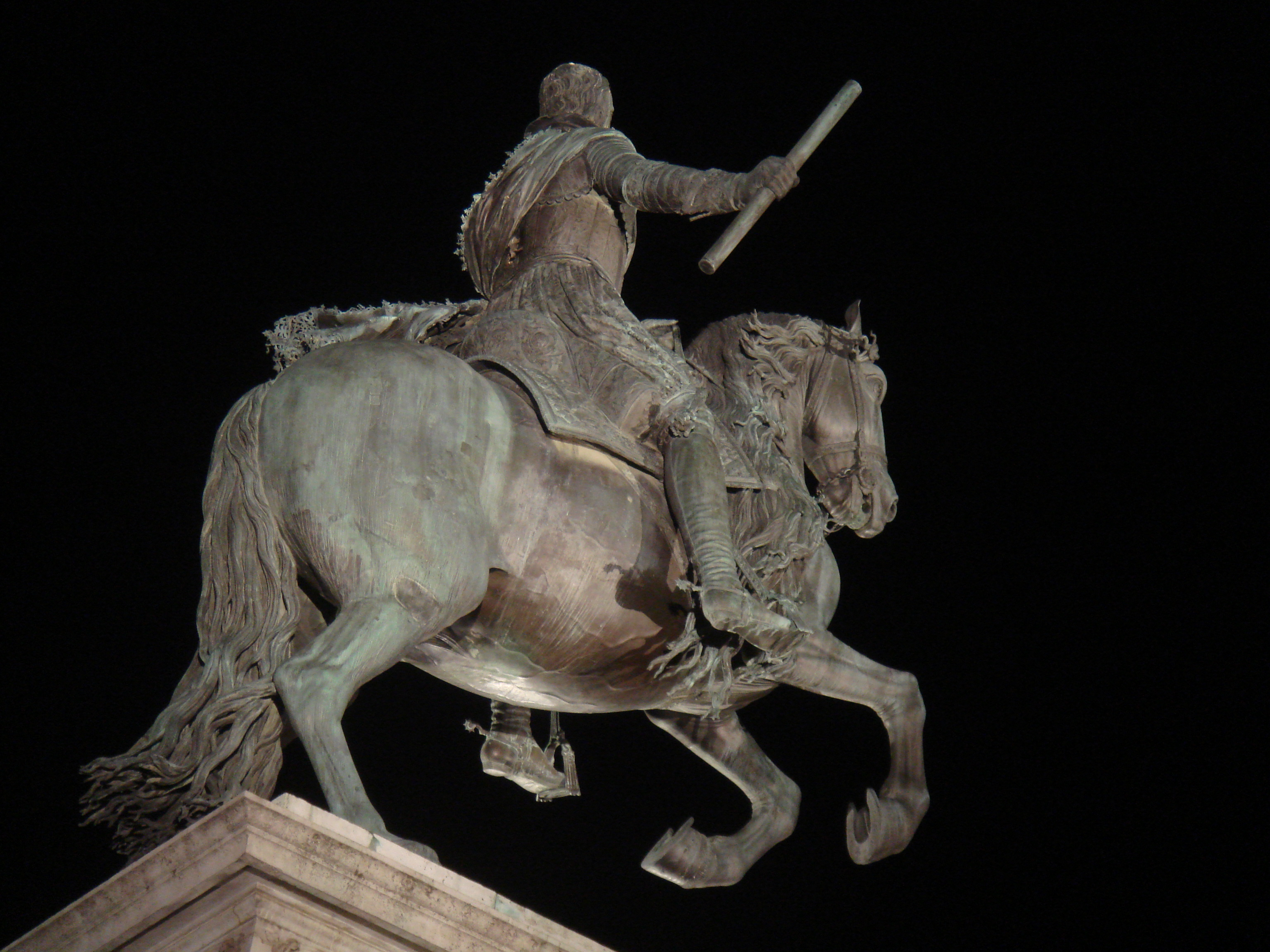 Escultura ecuestre de Felipe IV de España en la plaza de Oriente de Madrid, obra de Pietro Tacca (visión nocturna).